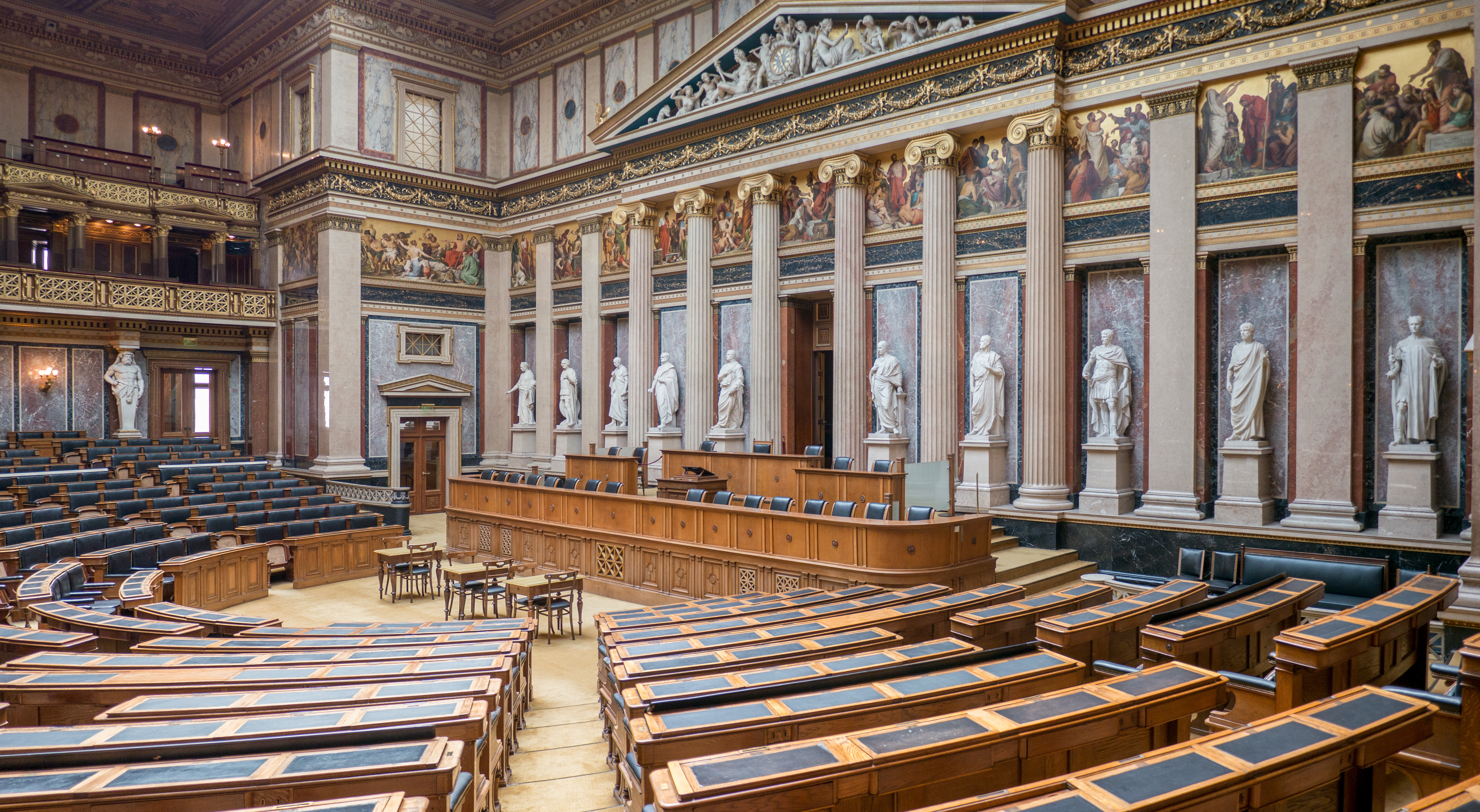 Parlamentsgebäude